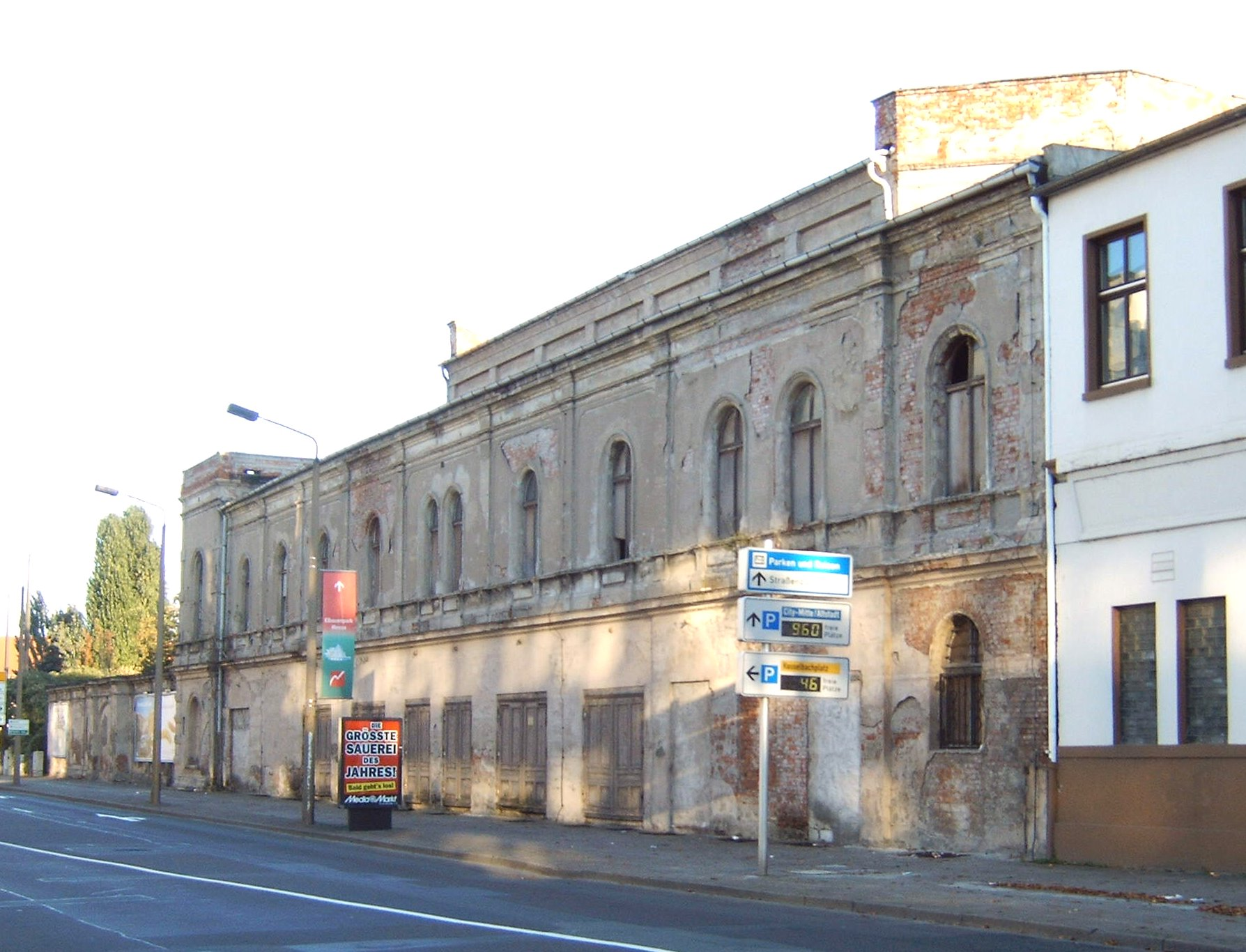 Kristall-Palast Magdeburg, Nordseite, Fuchsberg